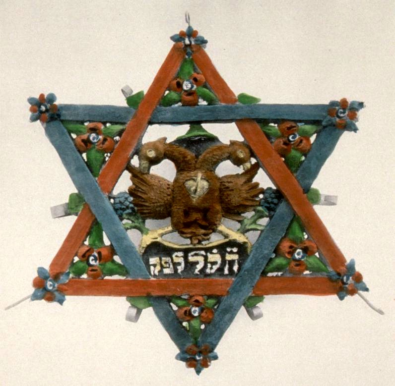 Etoile de David en bois sculpté polychrome daté de 1770, Jungholtz (Haut-Rhin)